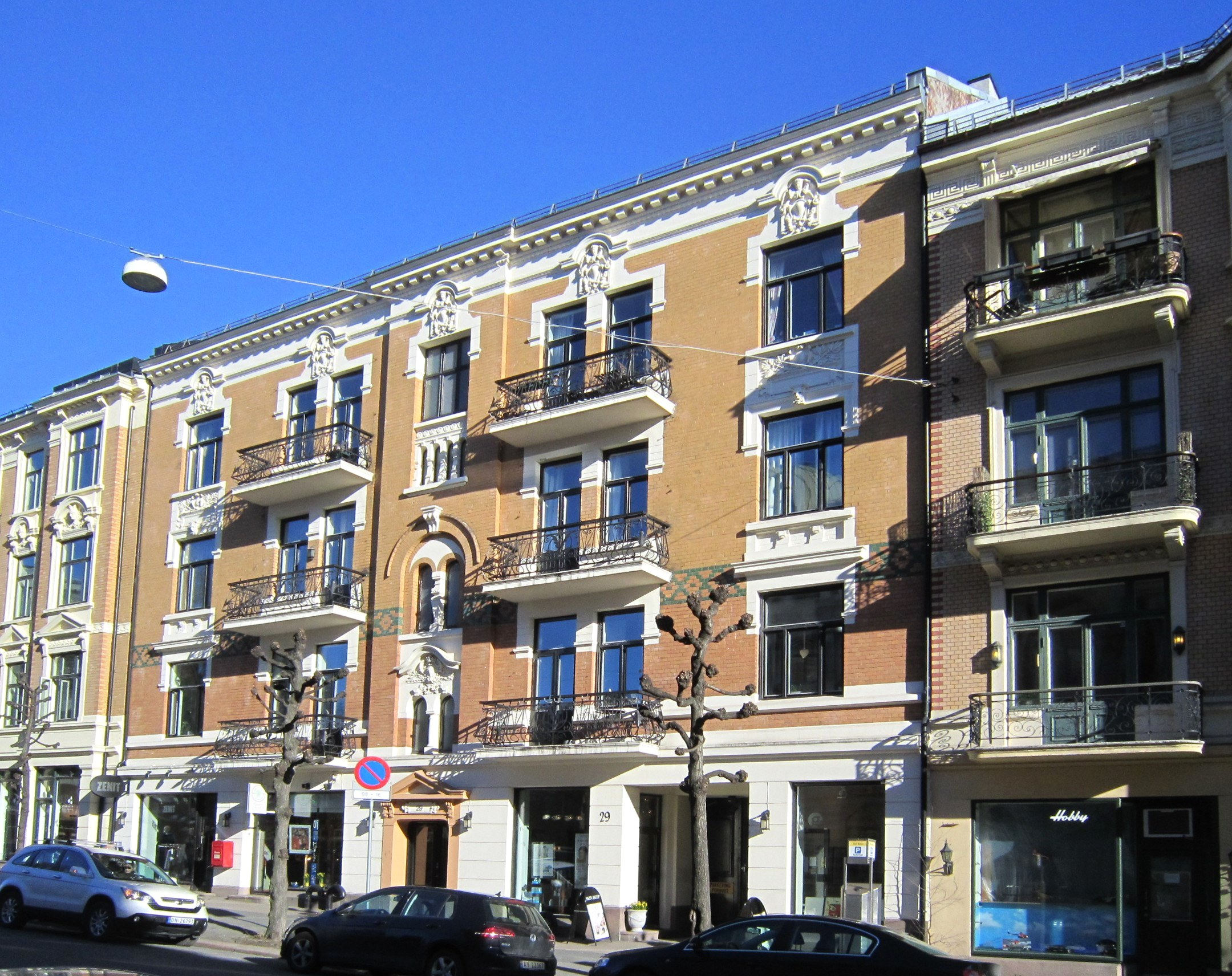 Skovveien 29 i Oslo